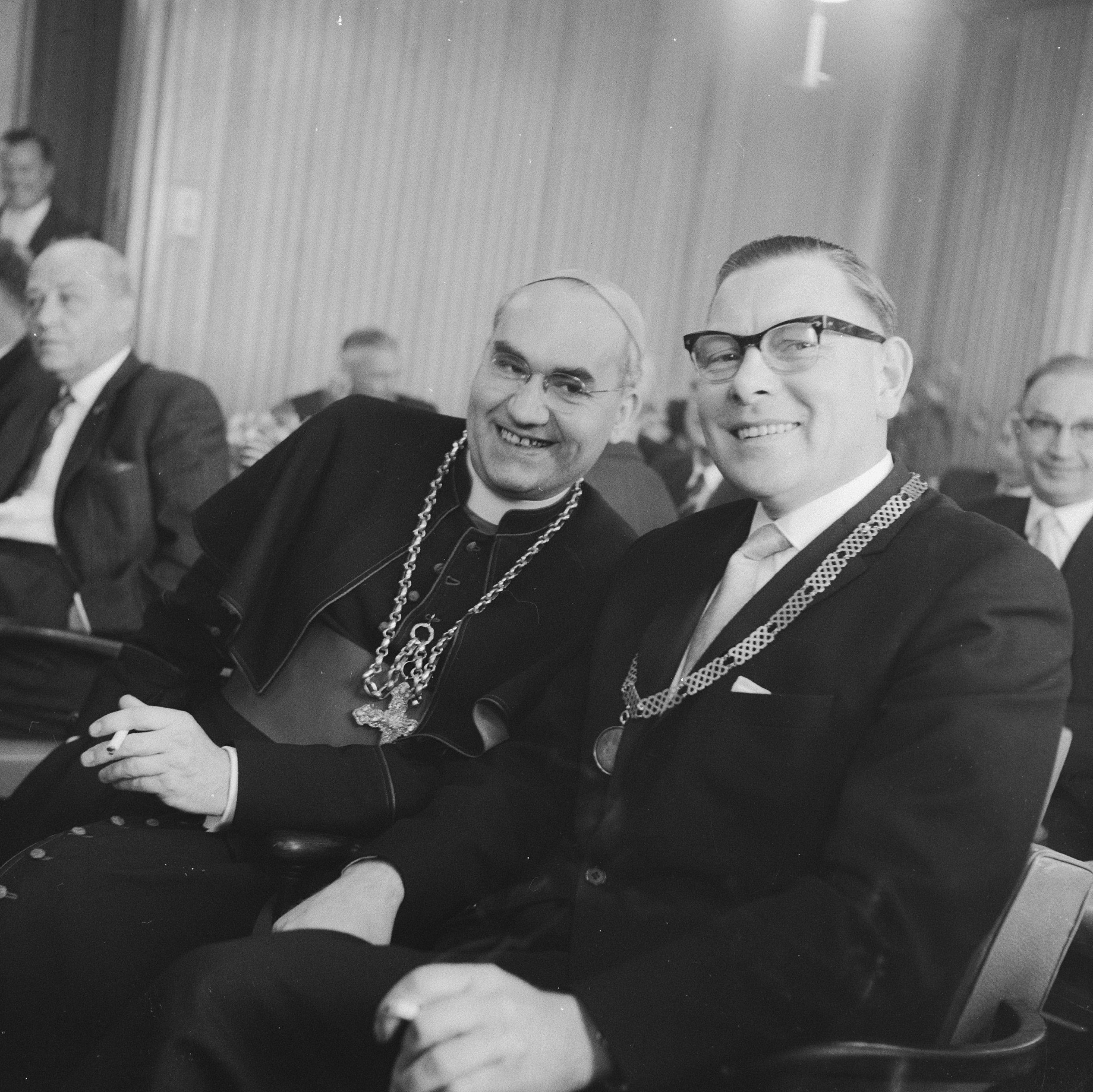 Collectie / Archief : Fotocollectie Anefo Reportage / Serie : [ onbekend ] Beschrijving : Klerkbezoek van Monseigneur dr. J.A.E. Dodewaard. Babbeltje tussen Burgemeester Franken (Zaandam) en bisschop Dodewaard Datum : 9 mei 1961 Locatie : Noord-Holland, Zaandam Persoonsnaam : Dodewaard, J.A.E. Fotograaf : Nijs, Jac. de / Anefo Auteursrechthebbende : Nationaal Archief Materiaalsoort : Negatief (zwart/wit) Nummer archiefinventaris : bekijk toegang 2.24.01.03 Bestanddeelnummer : 912-4625 Reacties Geplaatst door Maaike op 11 maart 2014 - 17:31. Persoonsnamen: G.J.D. Franken